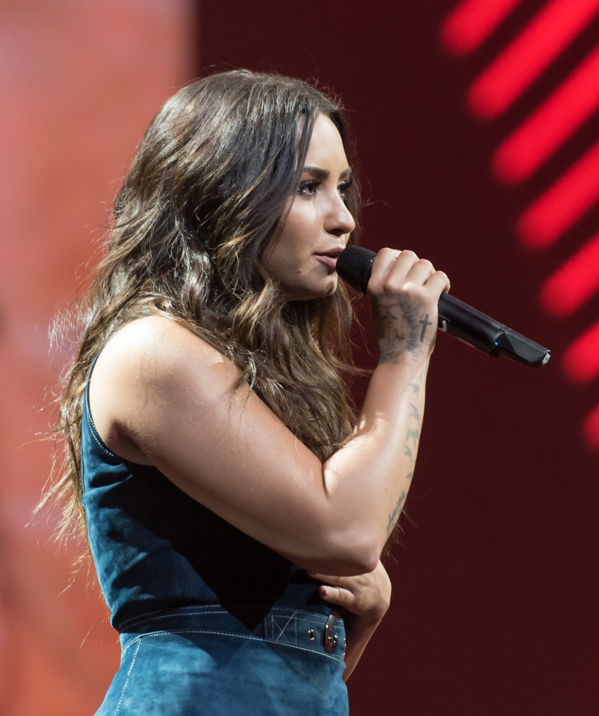 Demi Lovato beim Global Citizen Festival in Hamburg